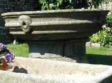 Henvic : la vasque de l'ancien manoir de Lézireur (vers 1700) inscrite Monument historique le 22 mars 1930.